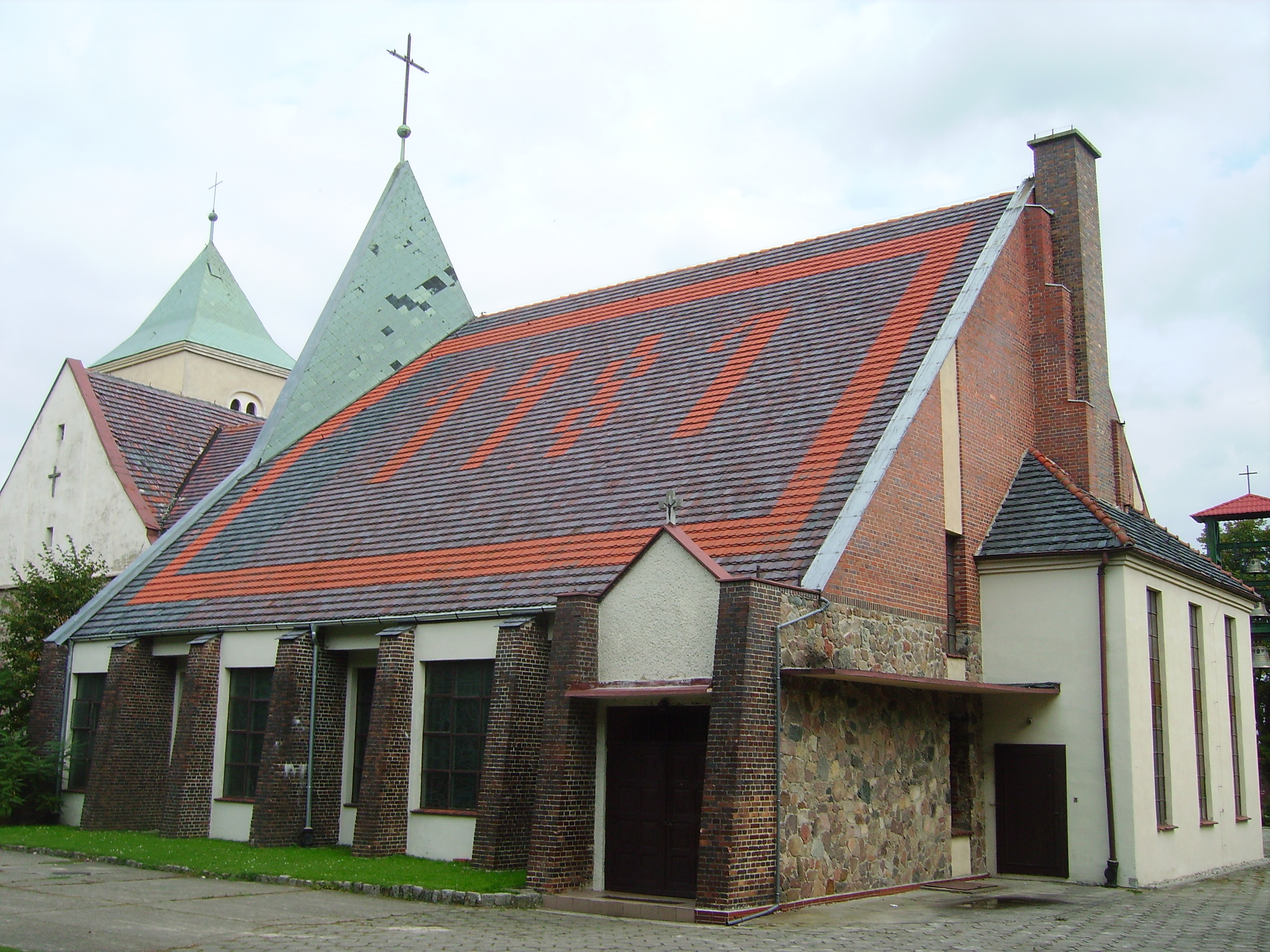 Nowogród Bobrzański, zespół kościoła fil. p.w. św. Bartłomieja, XIII/XIV, 1712-1720